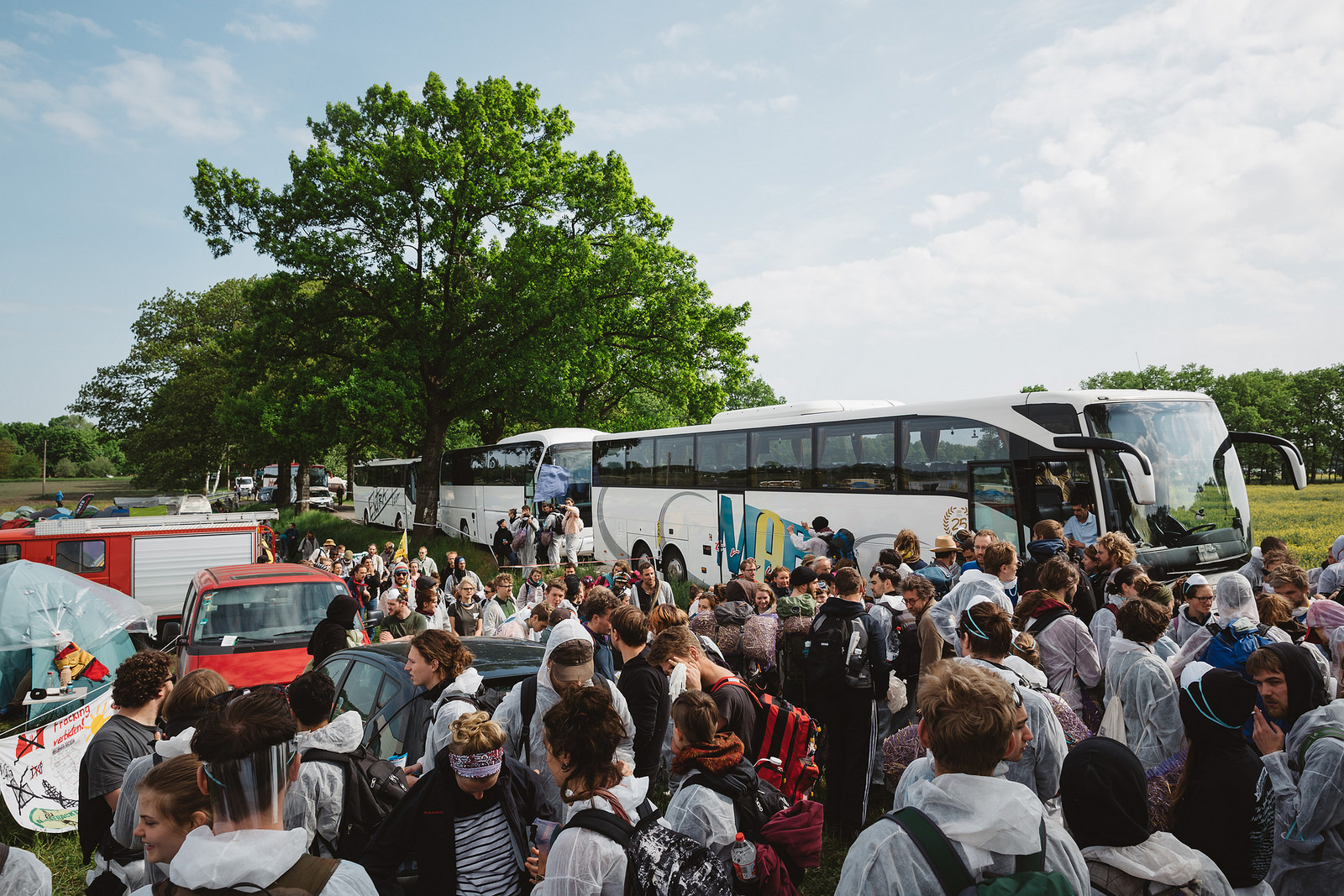 Busse bringen die internationalen Teilnehmer aus 12 europäischen Ländern. Viele reisten Freitag Nacht an, und fuhren schon Sonntag Nacht ab.